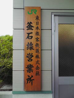 JR東日本釜石線営業所 表札